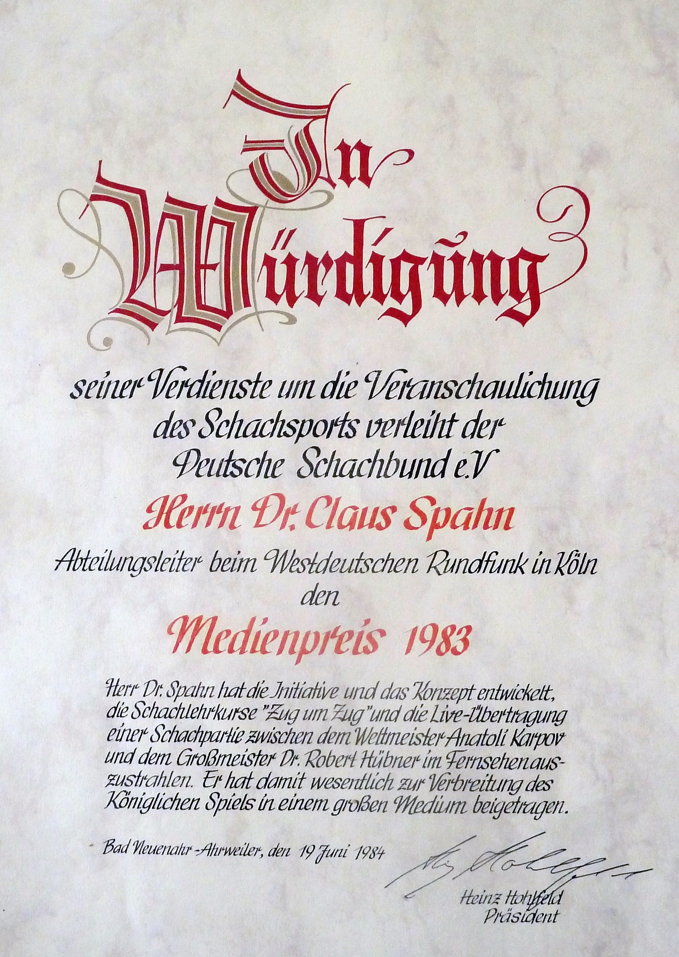 Urkunde zum Medienpreis 1983 des Deutschen Schachbundes (gez. Heinz Hohlfeld), verliehen an Dr. Claus Spahn (Westdeutscher Rundfunk).